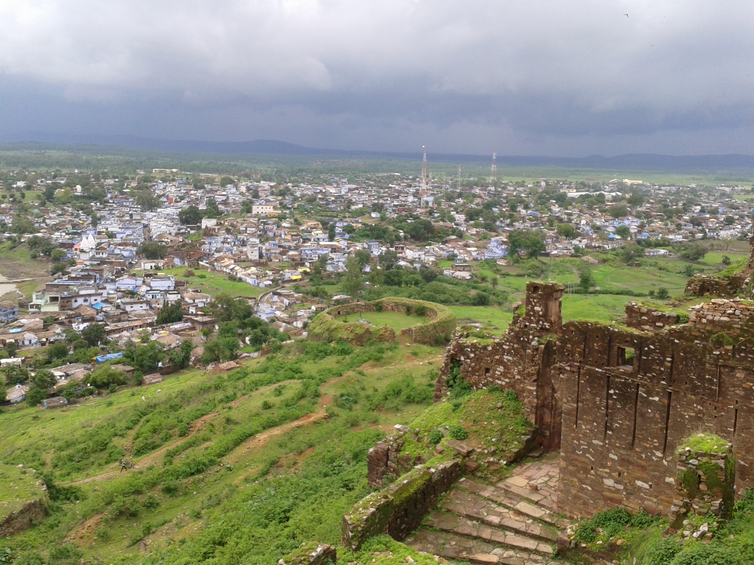 राहतगढ़ का एक दृश्य